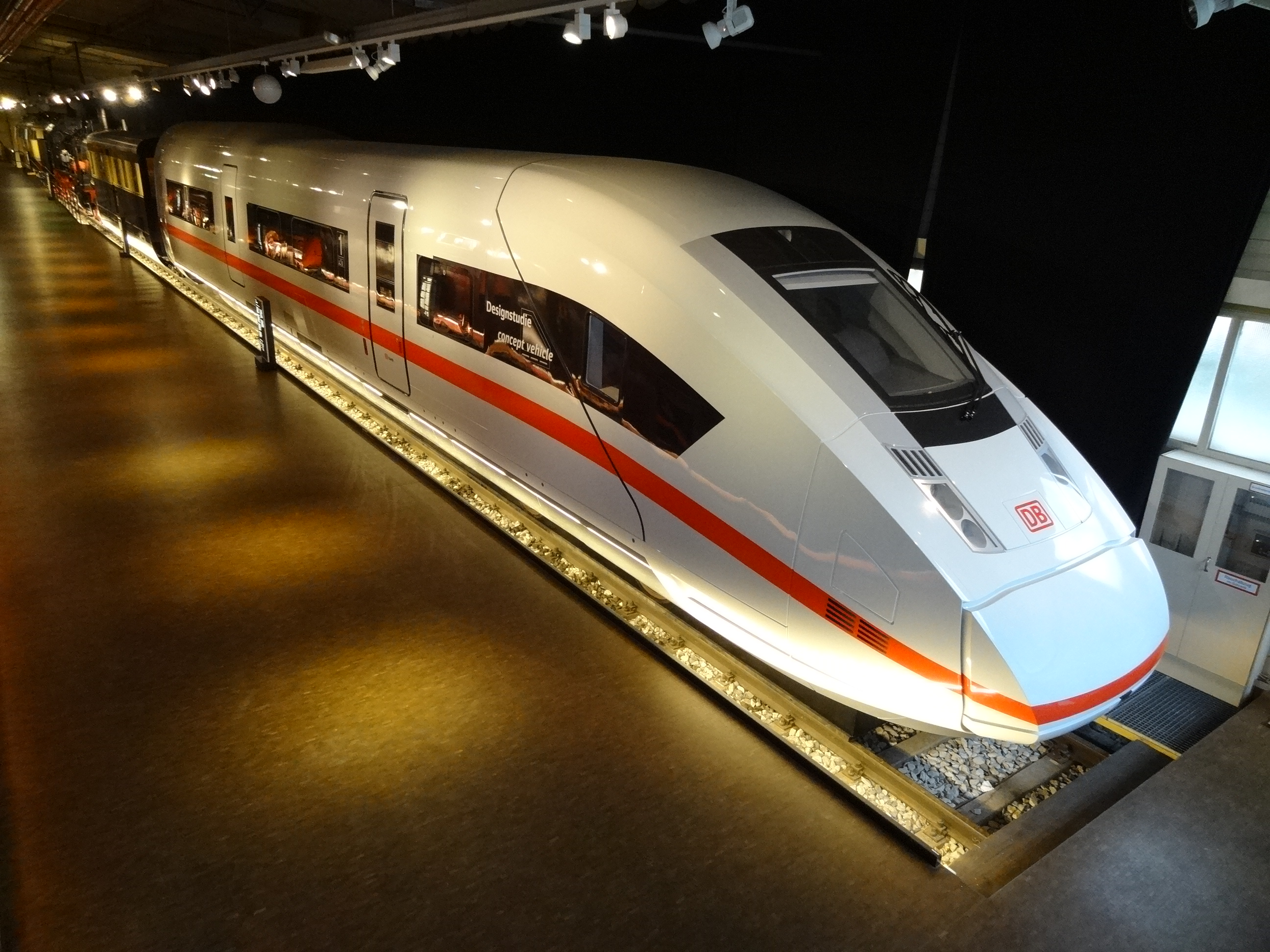 "Das Mock-Up des "ICx" ist ein Modell im Maßstab 1:1, das für eine Designstudie hergestellt wurde. Es diente dazu, die Tauglichkeit der Sitzplatzanordnungen und Komforteinrichtungen durch Testpersonen feststellen zu lassen"